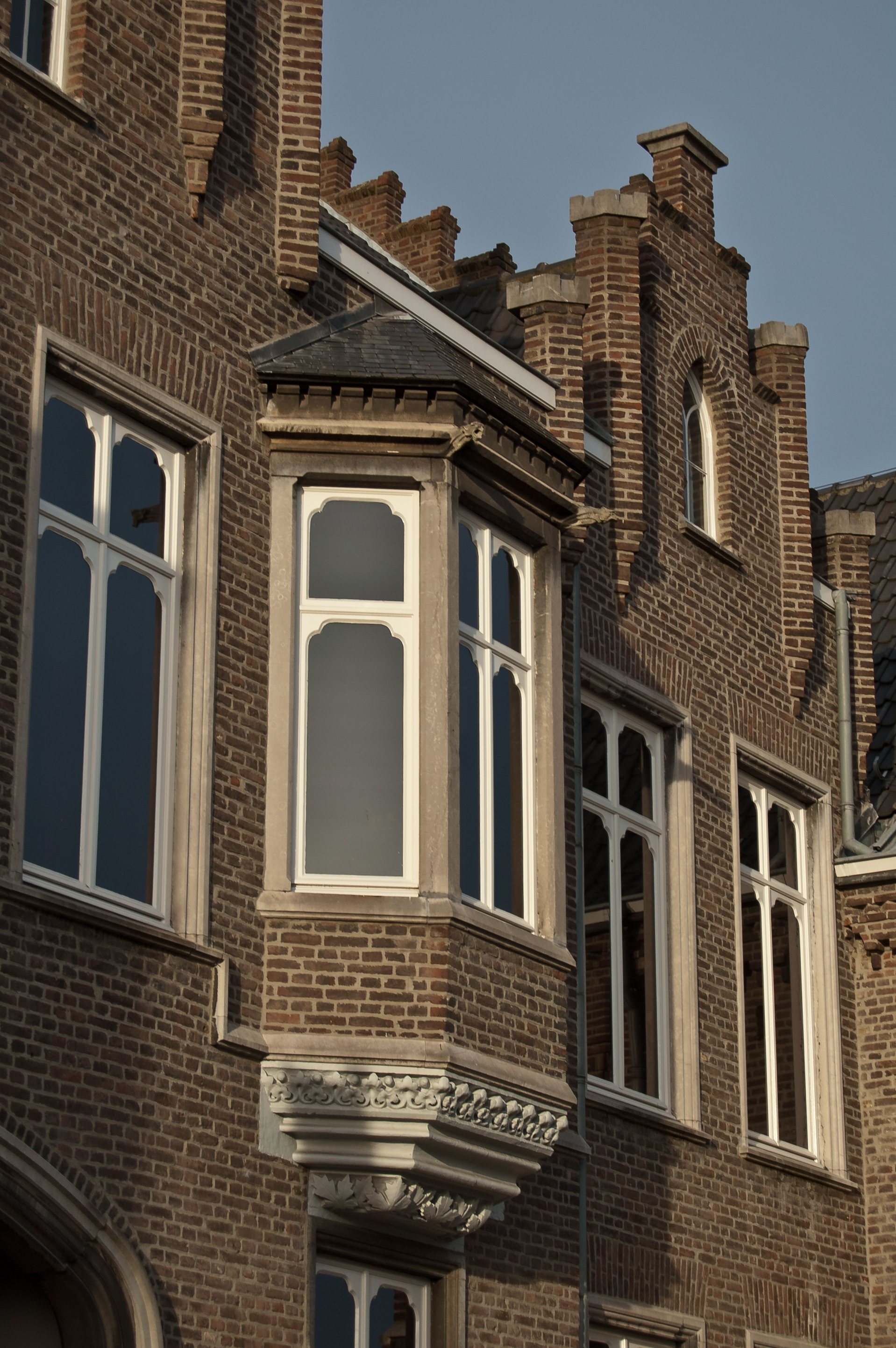 Fassadendetail am mittleren Trakt des Wohn- und Atelierhauses des Architekten Pierre Cuypers in Roermond, heute Stedelijk Museum.